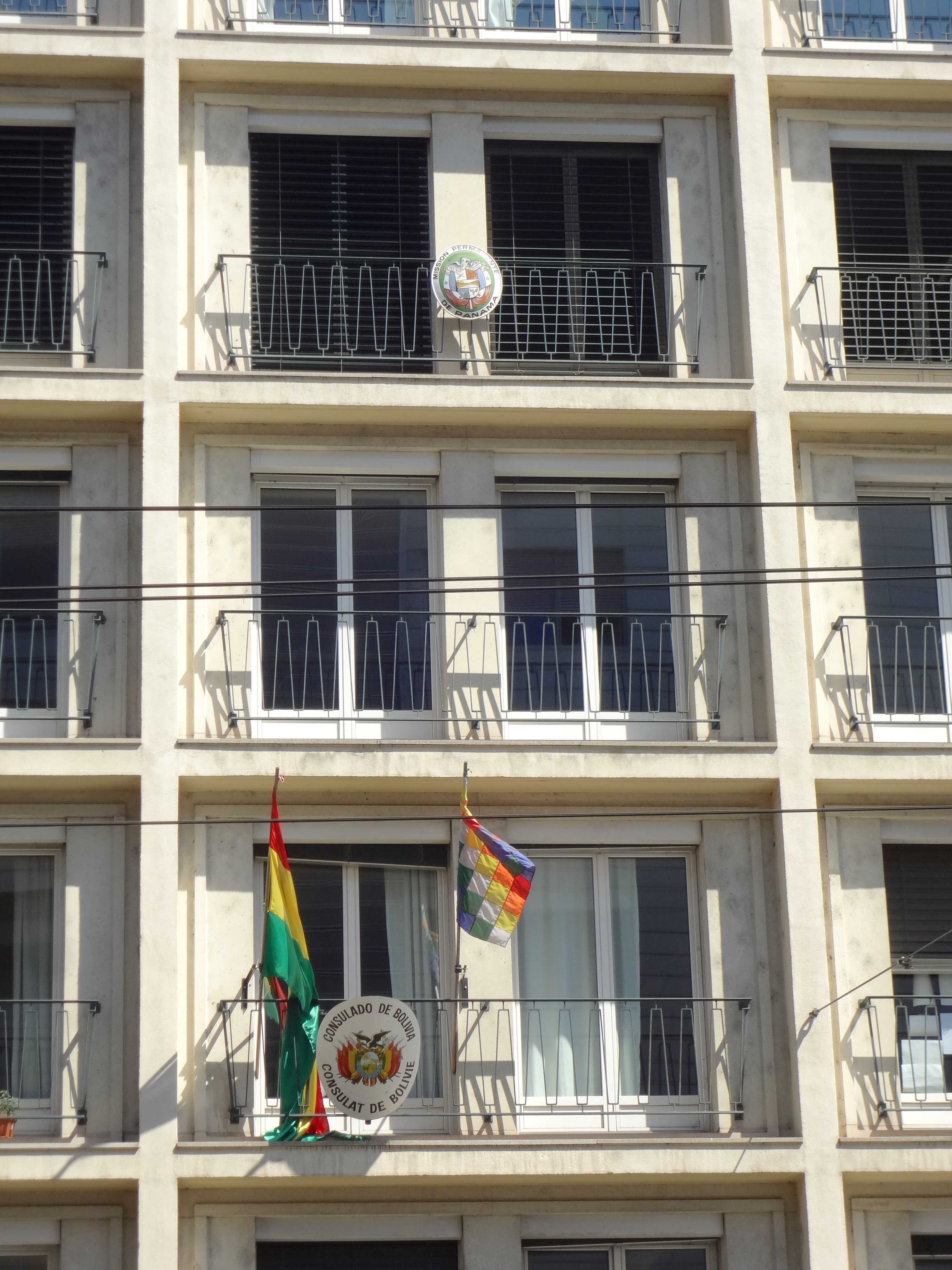 Bâtiment au 72 rue de Lausanne à Genève. Consulat de Bolivie au 2ème étage. Mission permanente et Consulat général de Panama au 4ème étage.